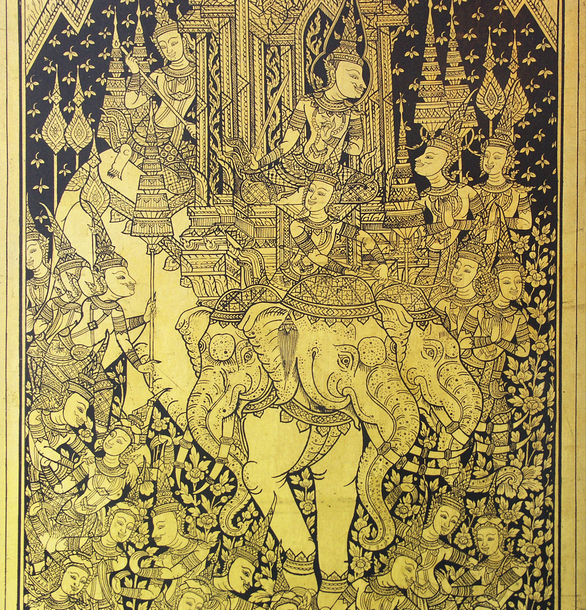 Wat Suthat, Bangkok, Thailand